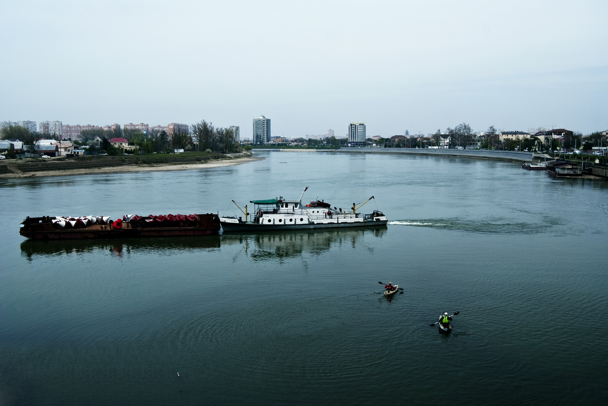 Река Кубань. Город Краснодар. Водный транспорт и спорт. Байдарки.